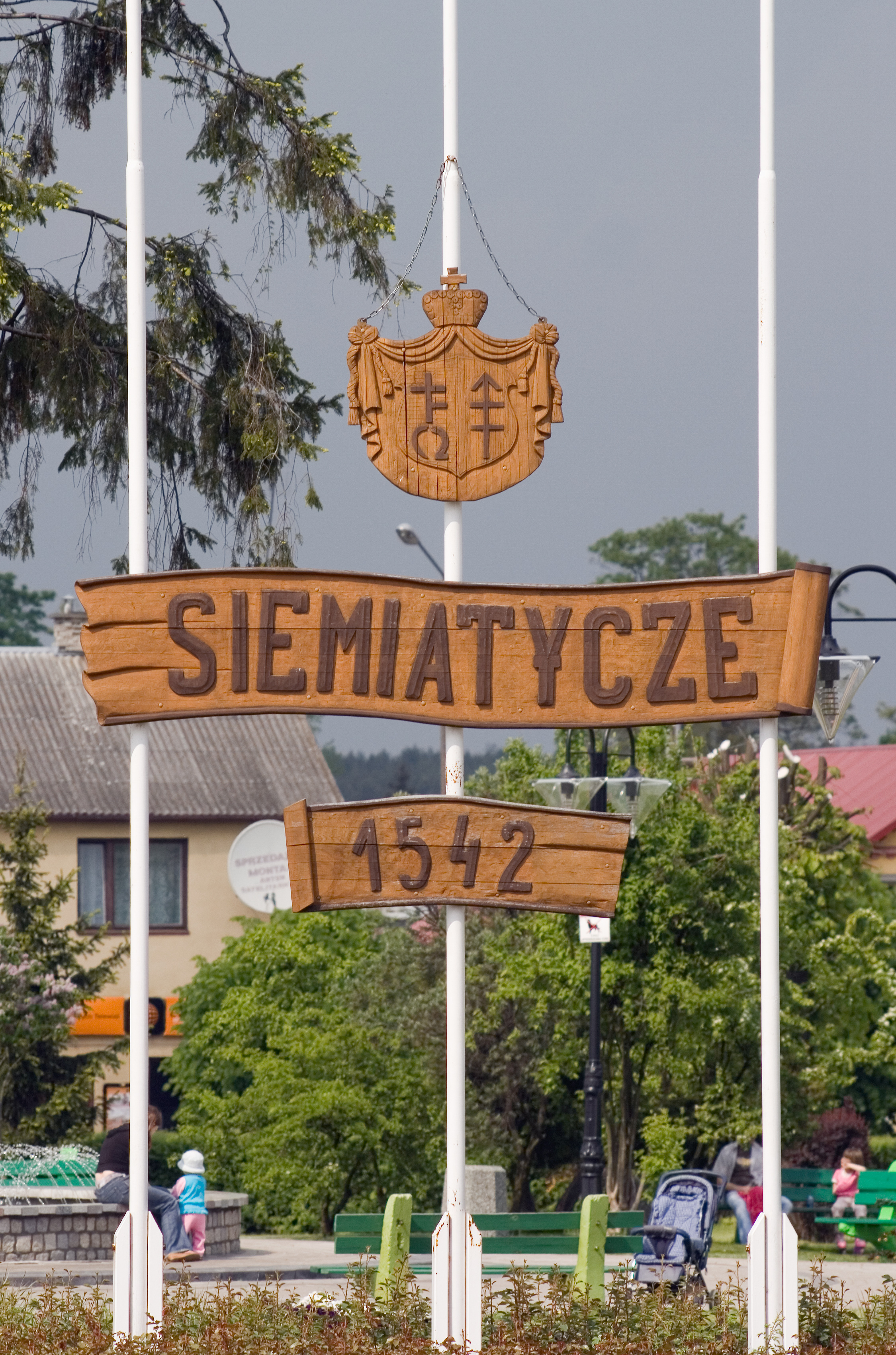 Rondo w Siemiatyczach – herb miasta.